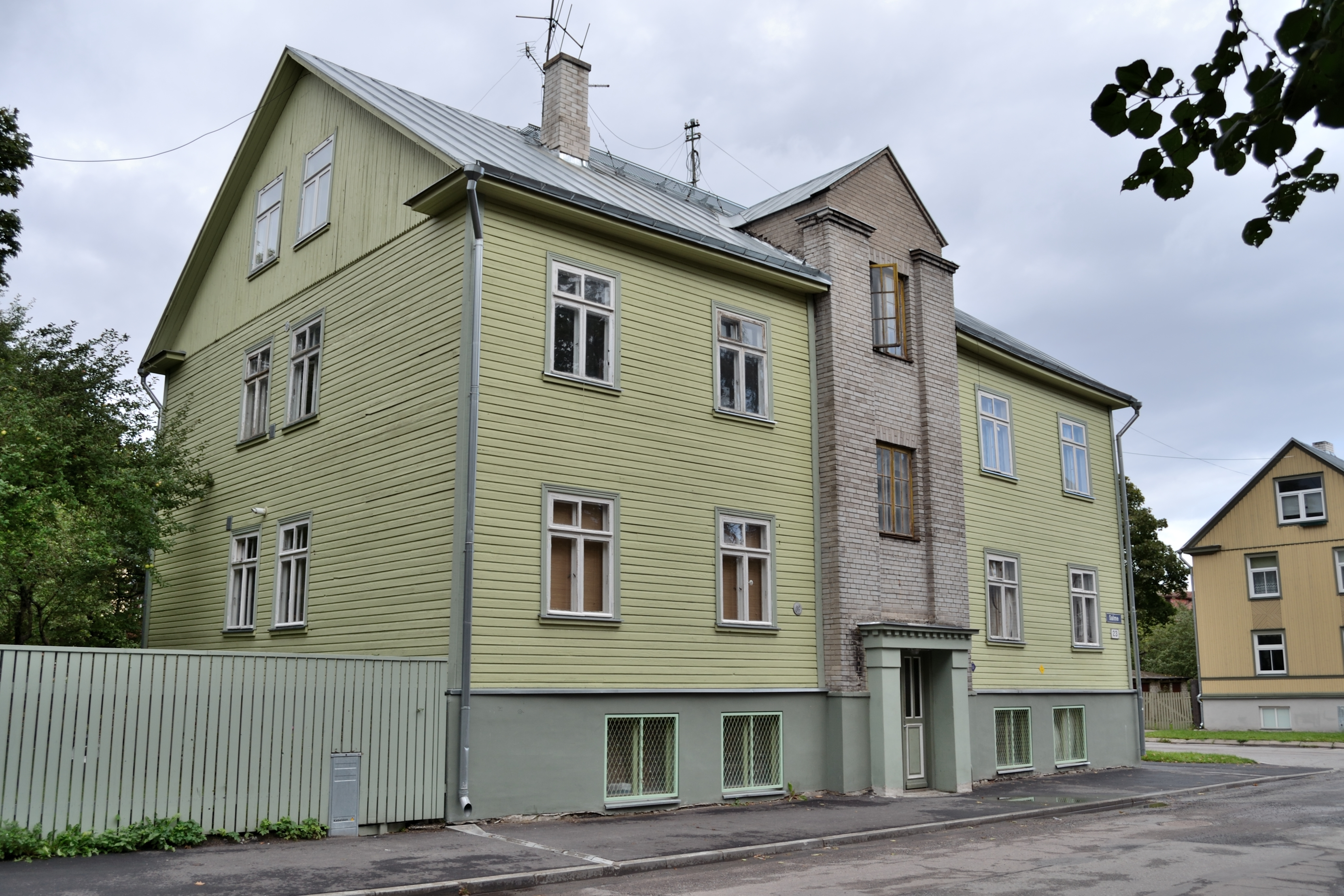 Tallinn, elamu Kalevi 27, 1920.-1930